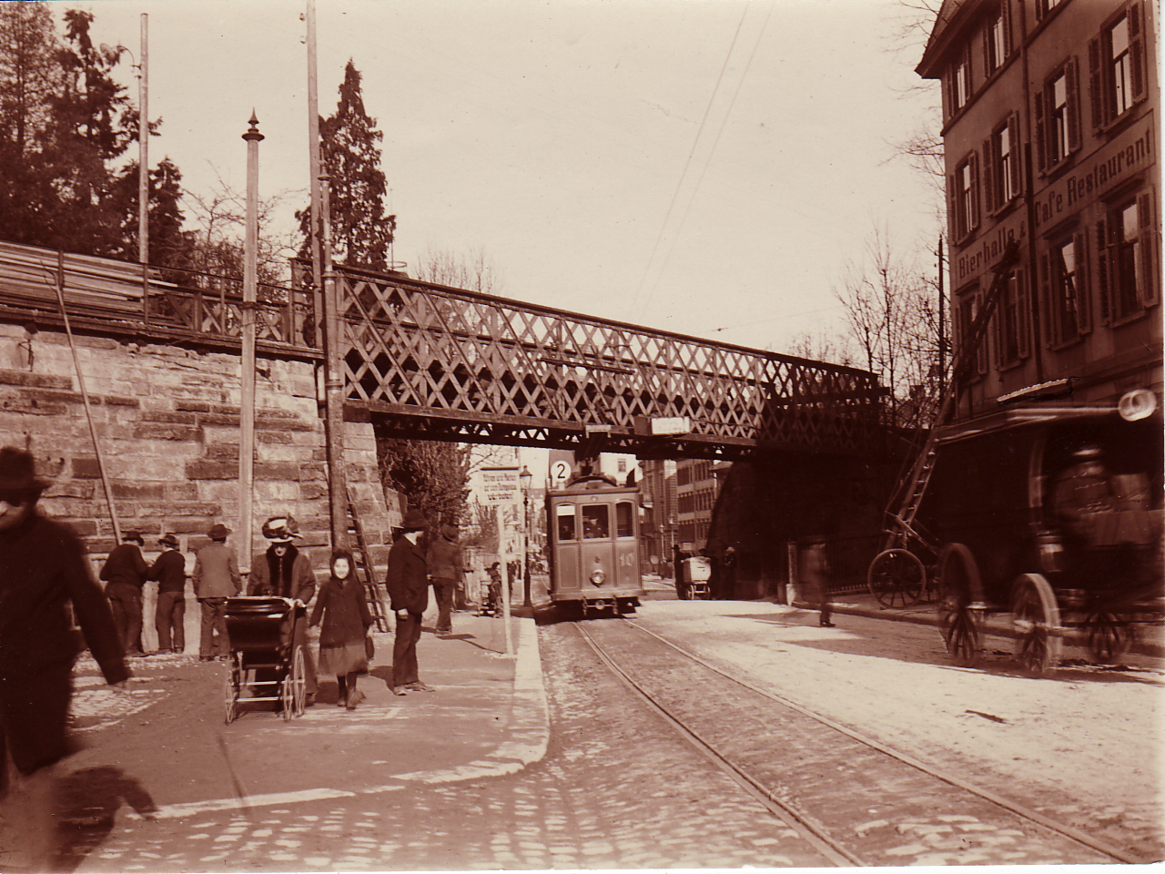 St.Jakob-Strasse, Eisenbahnbrücke über die St.Jakob-Strasse enthält: Blick gegen Osten; rechts St.Jakob-Strasse 14, Bierhalle & Cafe Restaurant; Die Blumenaubrücke wurde für die Bahnlinie St.Gallen - St.Fiden 1856 erbaut, im März 1913 abgebrochen, nach der Eröffnung des Rosenbergtunnels.